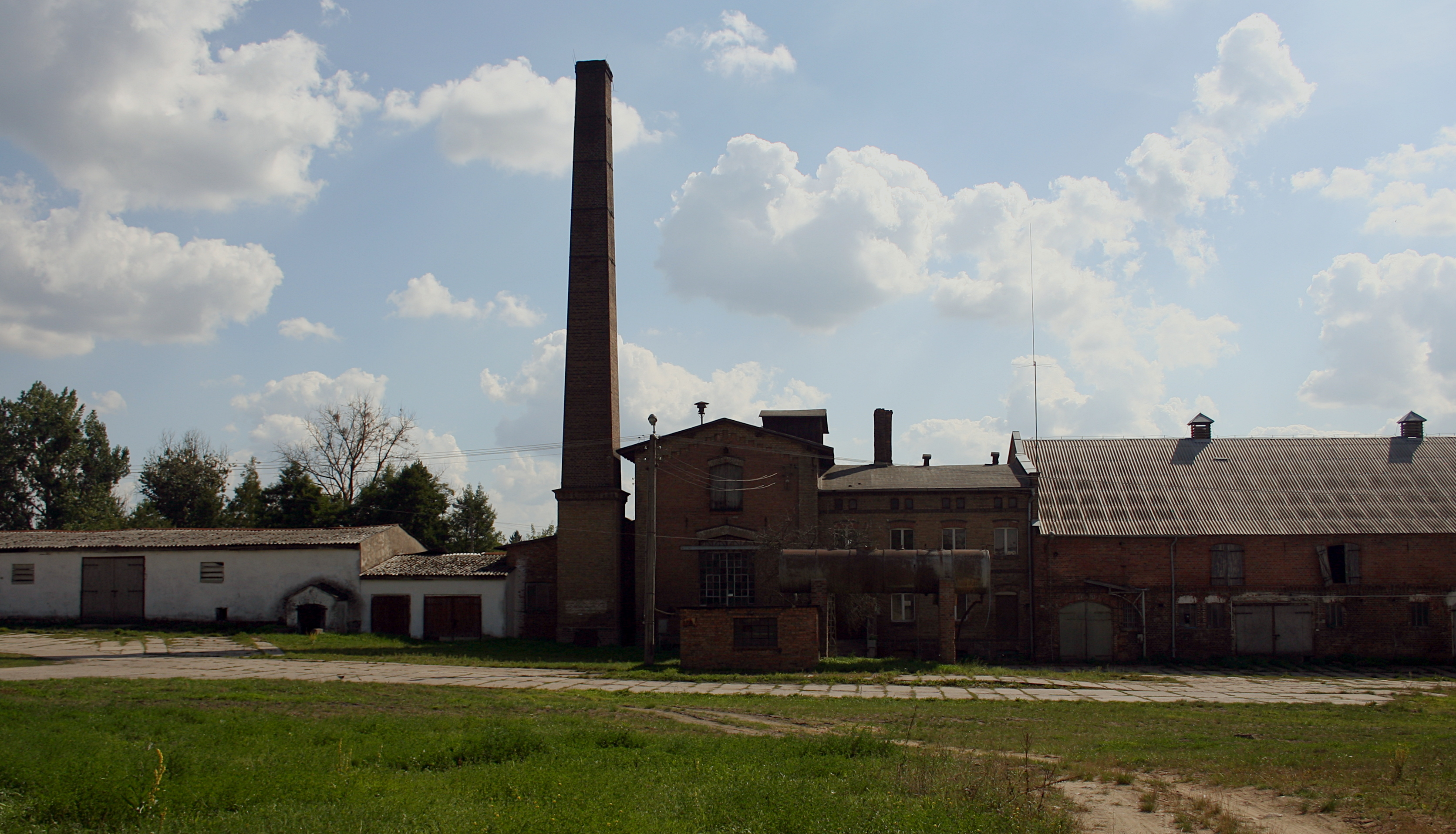 Zabudowania gospodarcze w Muchocinie, gmina Międzychód